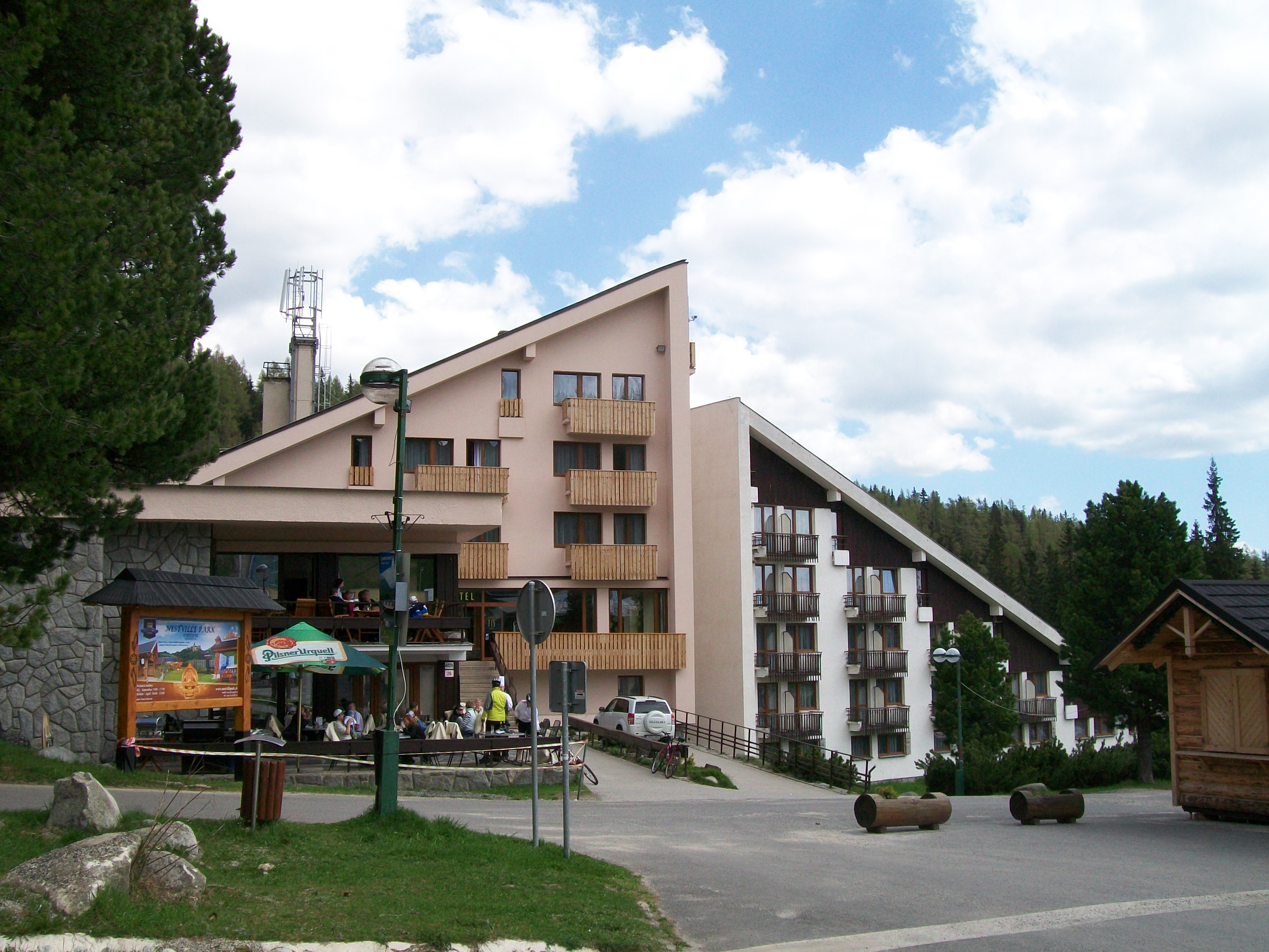 Hotel Fis v Štrbskom Plese